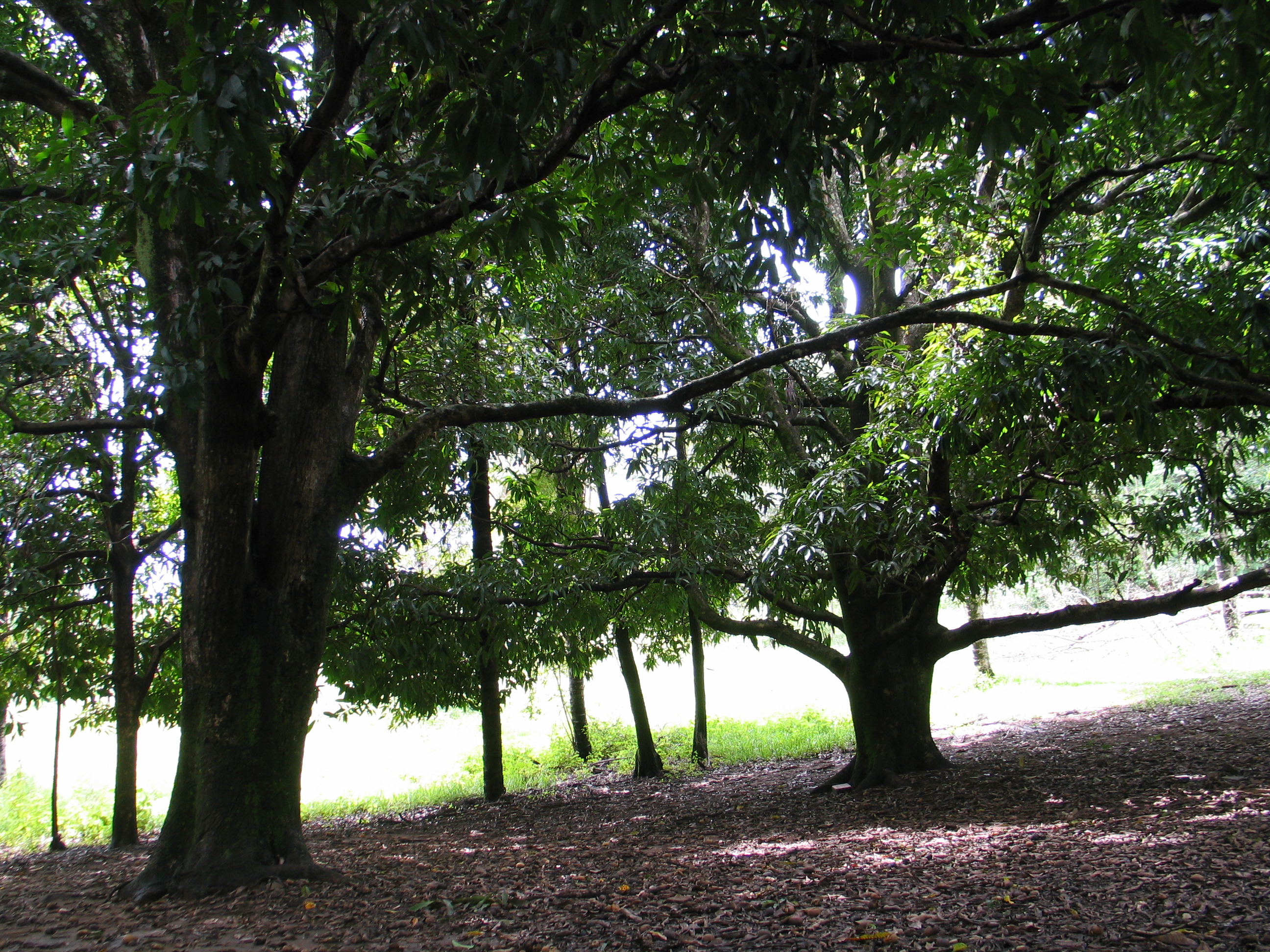 Árvores de grande porte na Serra do Cipó